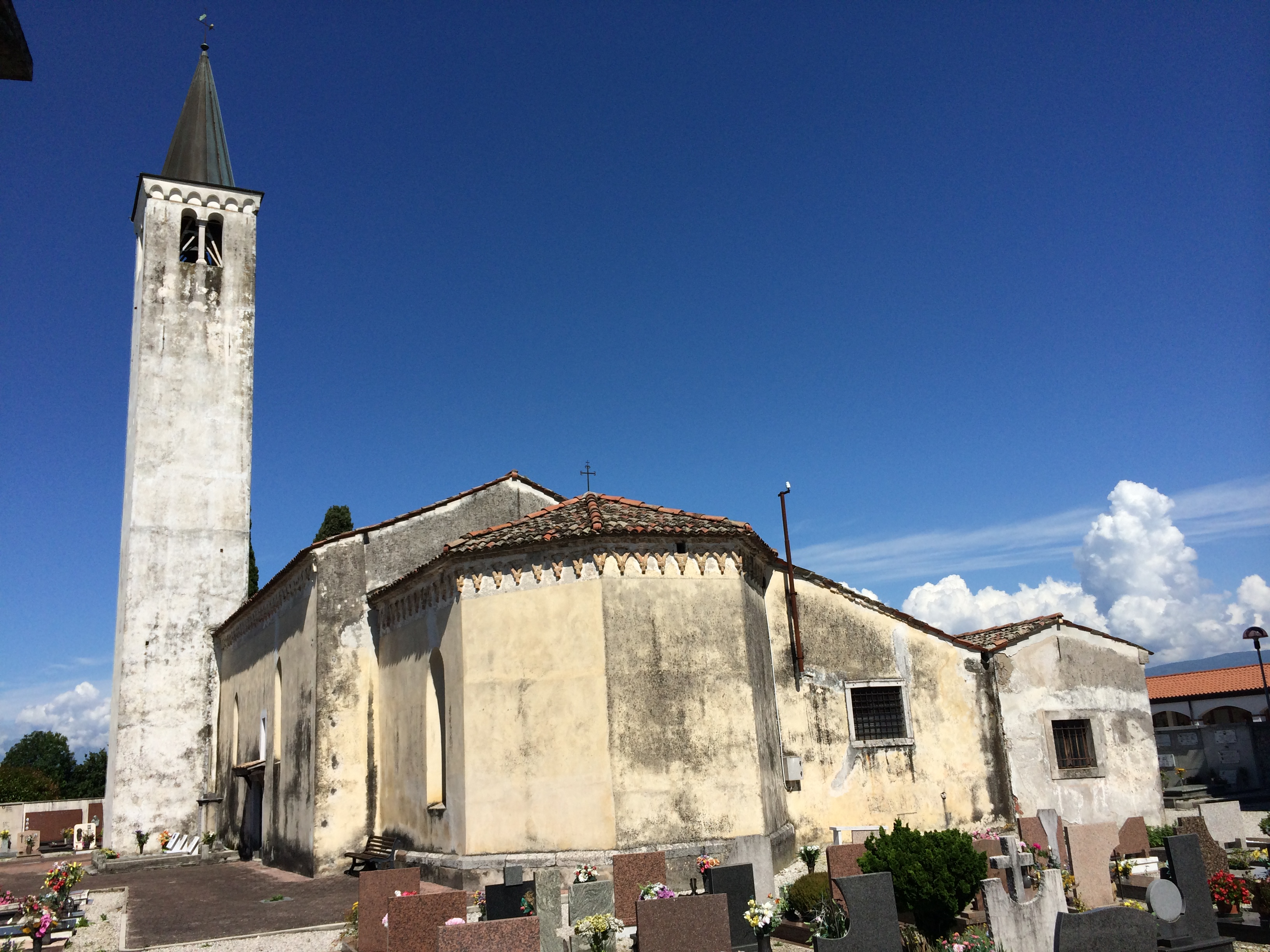 Vidulis - Chiesa San Pietro e Paolo 1